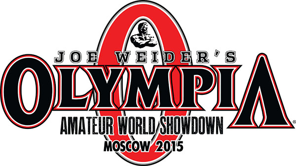 Эмблема Мистер Олимпия 2015